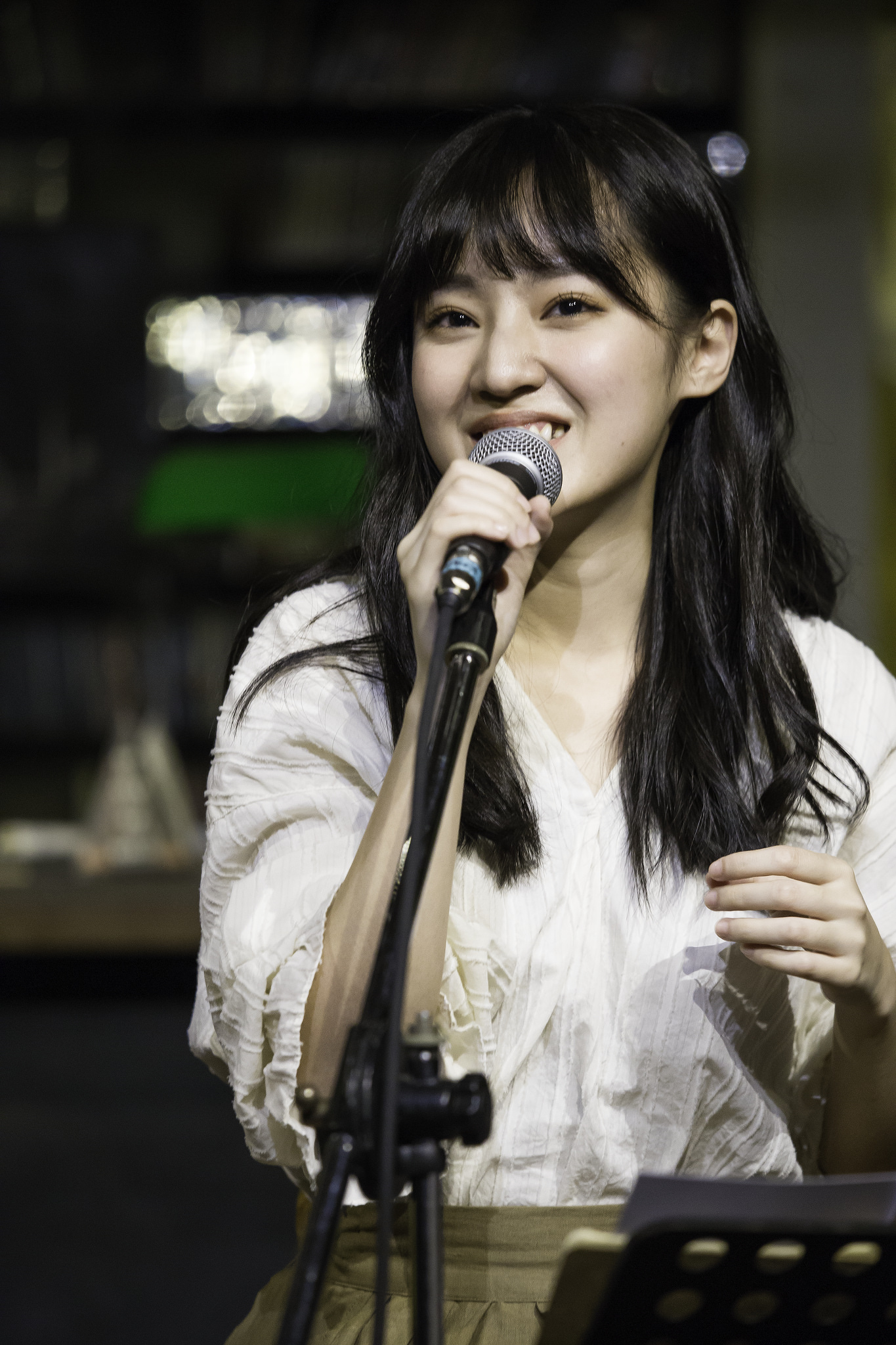 安婕希 *bon voyage* 音樂會